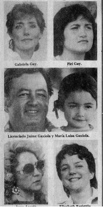 María Luisa Gaxiola y Dighero a los 4 años, acompaña a Jaime Gaxiola (su papá), a una corrida en la Monumental Plaza México.